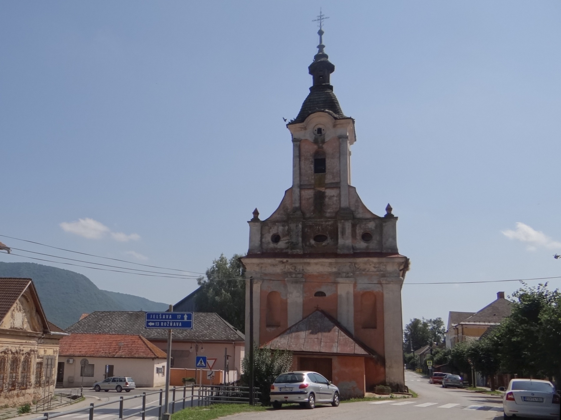 Štítnik